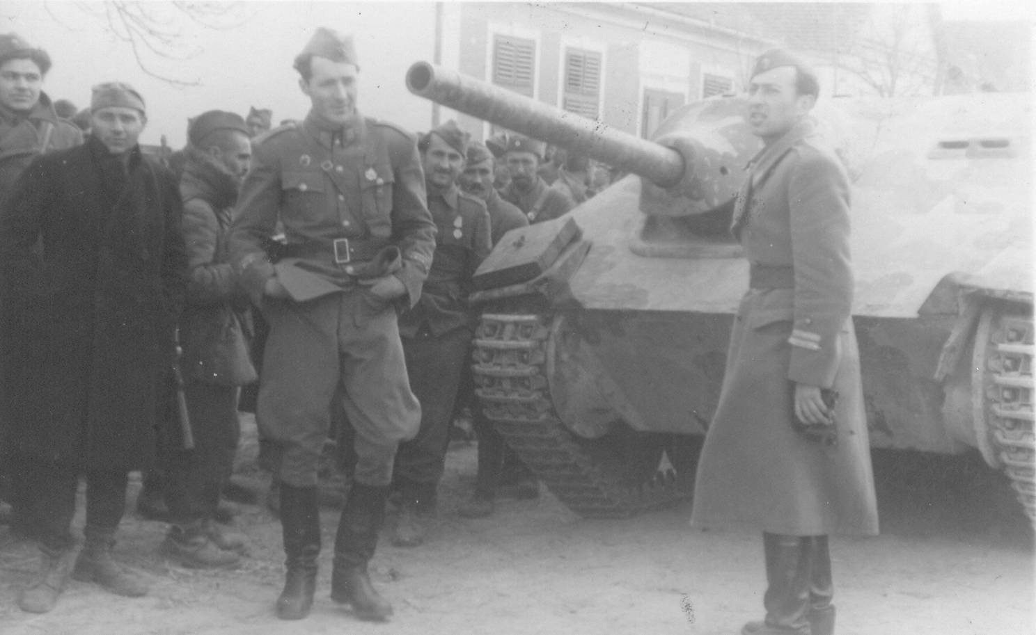 Jovo Kapicic, a sinistra, commissario politico del XII Korpus dell'Esercito popolare di liberazione jugoslavo